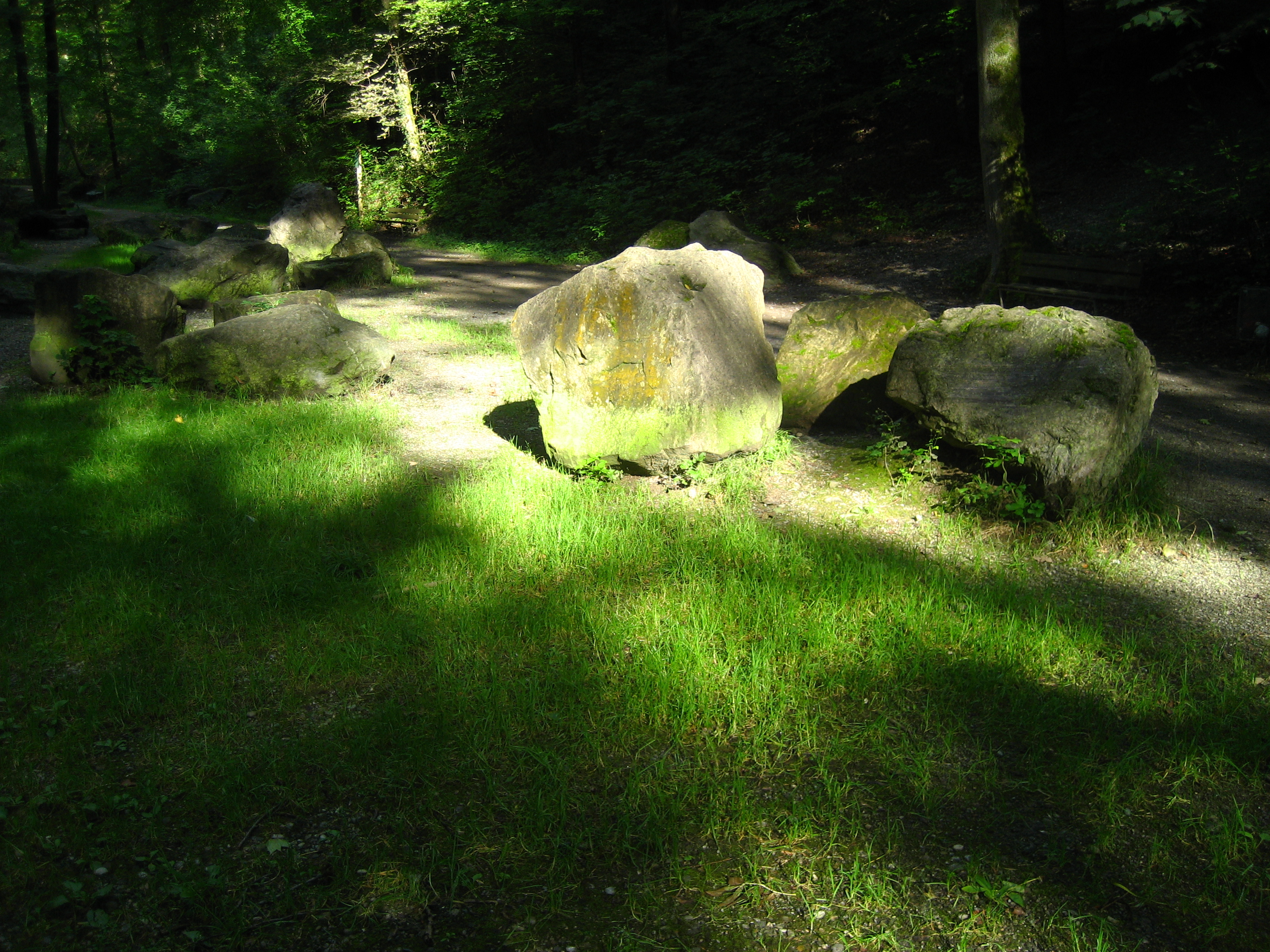 Küsnachter Tobel nearby Küsnacht (ZH)